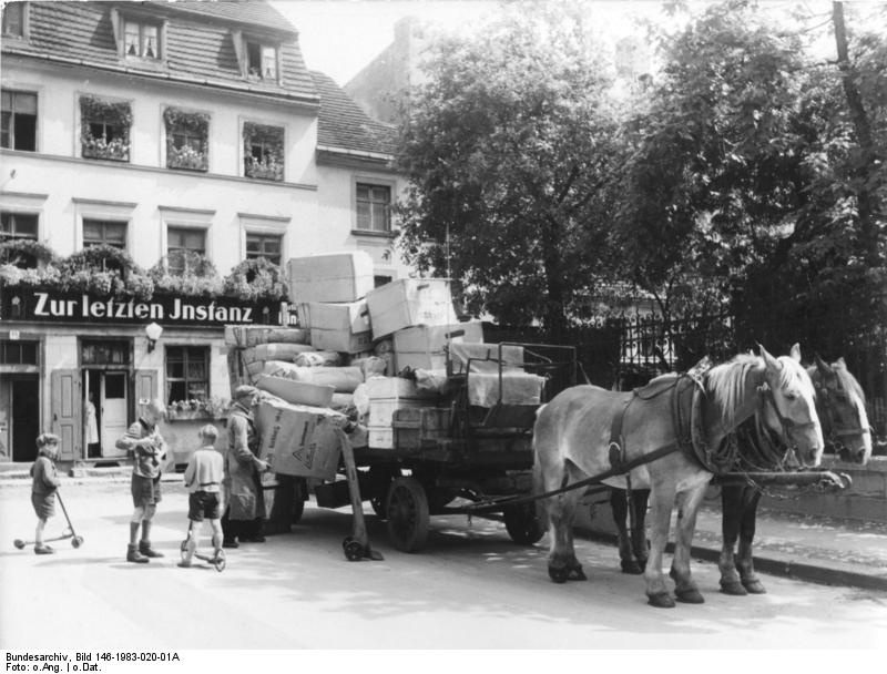 Das schöne Berlin Der Jüdenhof in der Berliner Altstadt. Die gemütlichen typischen märkischen Häuser mit den blanken Fenstern erinnern in keiner Weise an die frühere Bestimmung dieses Platzes. Er war bis 1350 Wohnsitz der Juden und war damals durch ein eisernes Gitter das abends geschlossen und morgens geöffnet wurde, von der übrigen Welt getrennt.